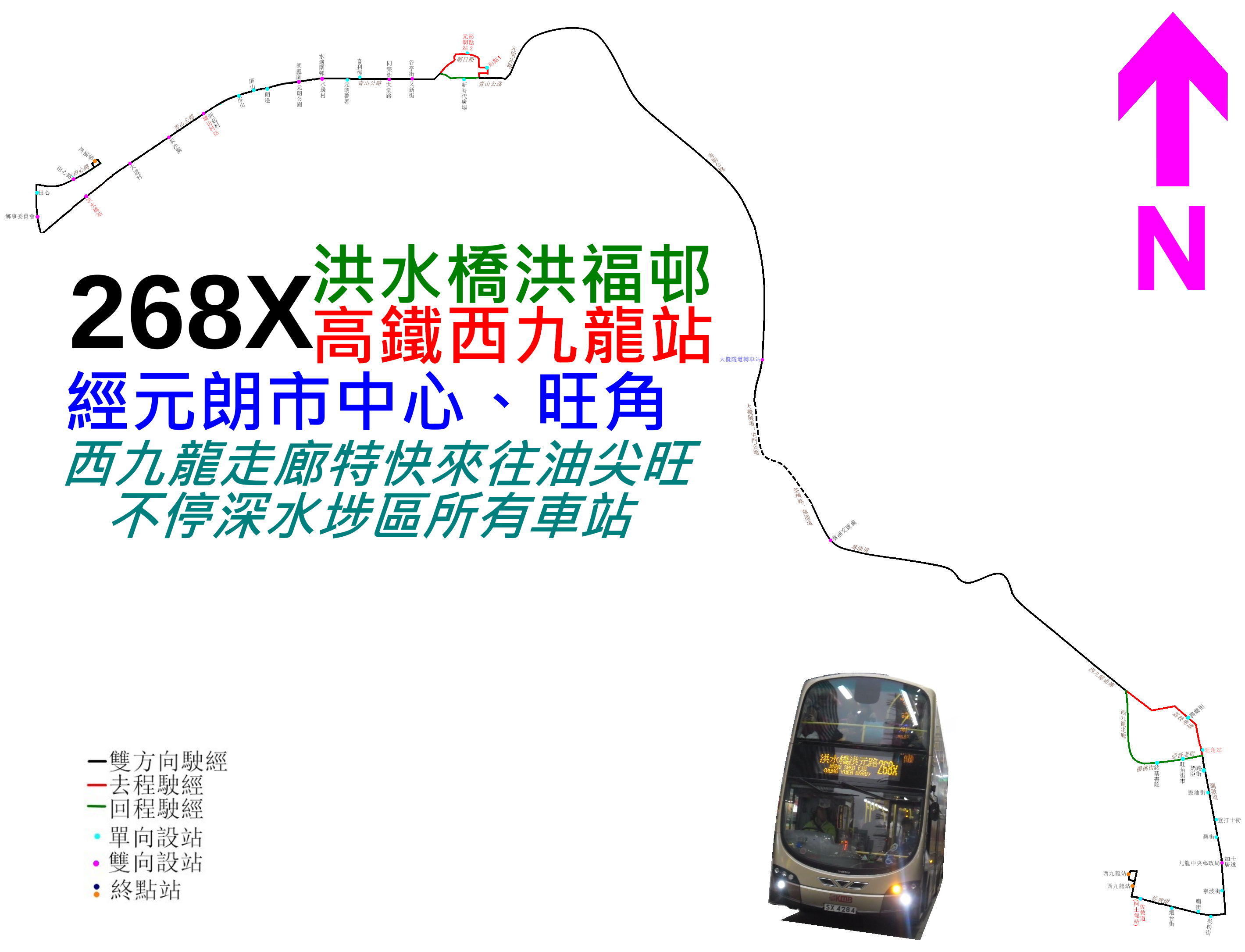 中文（香港）: 九巴268X線的走線圖